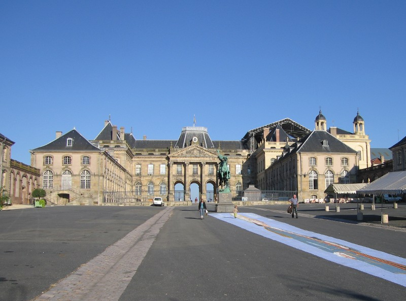 Château de Lunéville, cour avant. Septembre 2010.